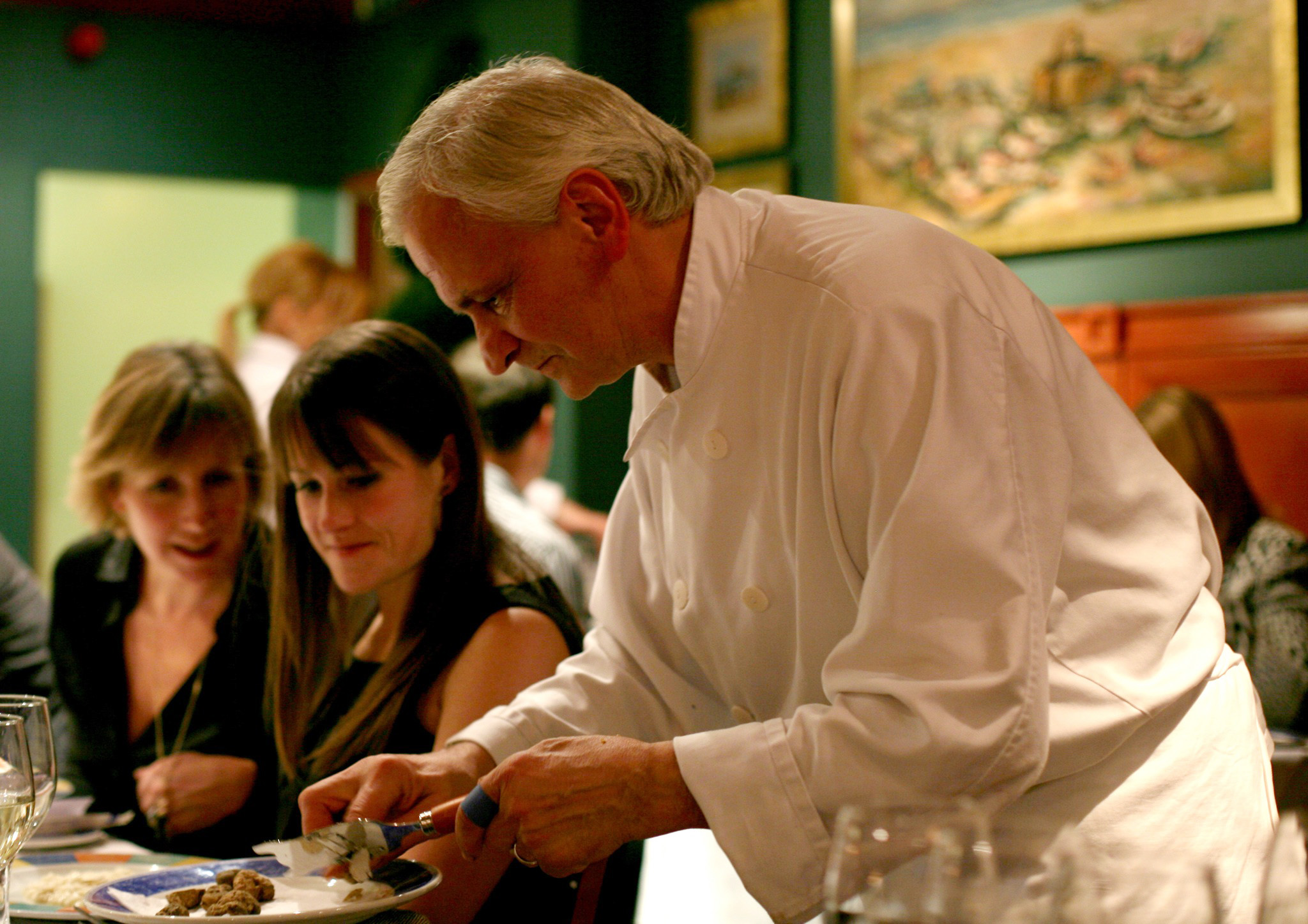 Chef préparant une truffe